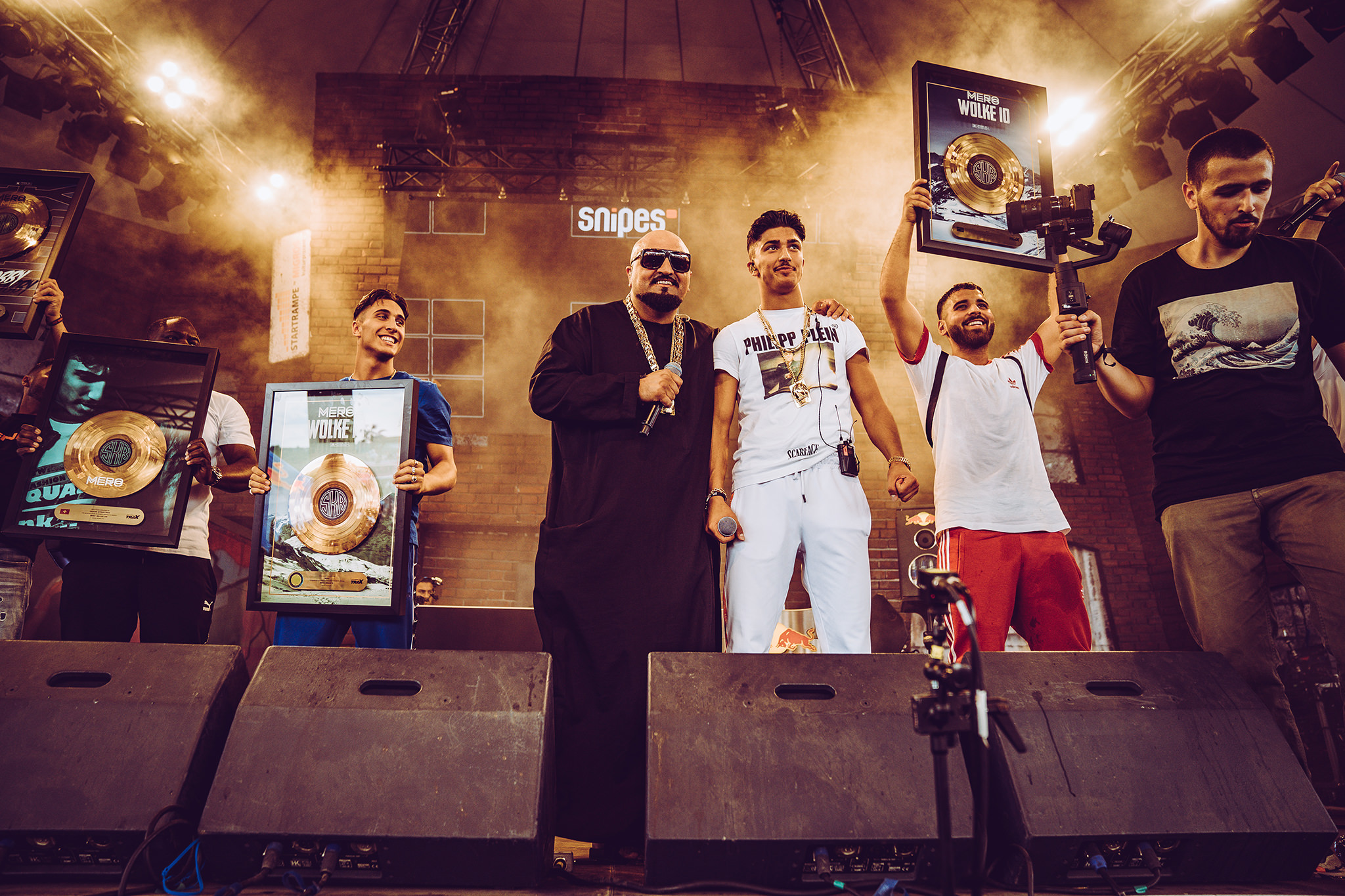 Goldverleihung mit Mero, Sero El Mero und Xatar